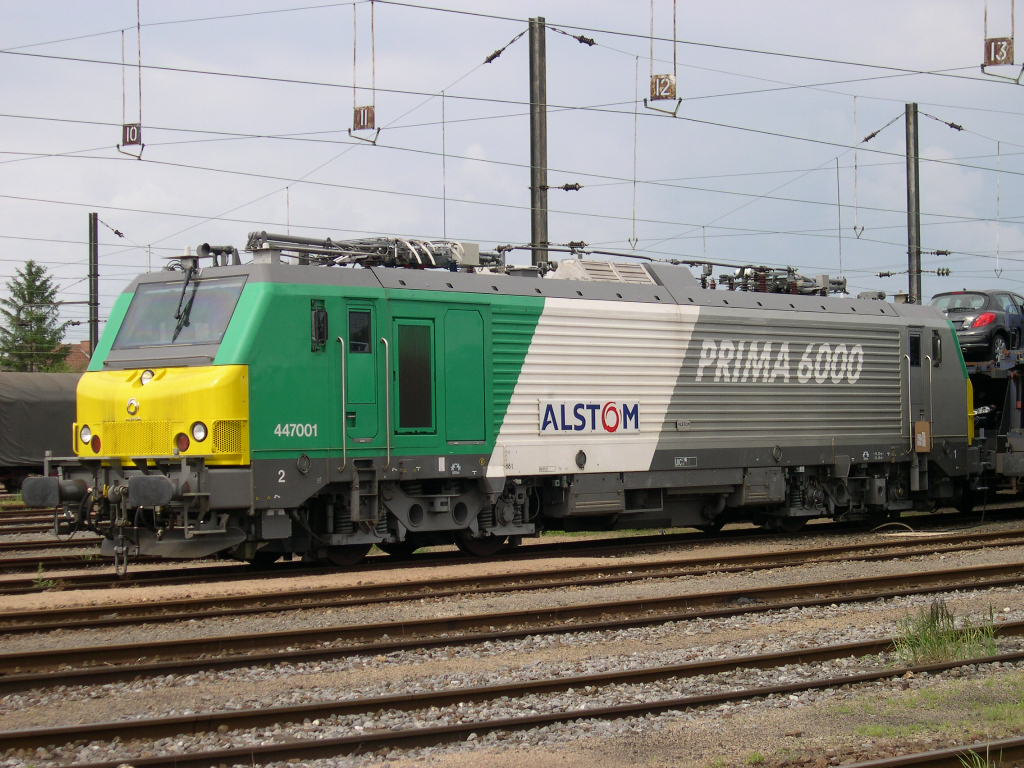 Locomotive BB 47000